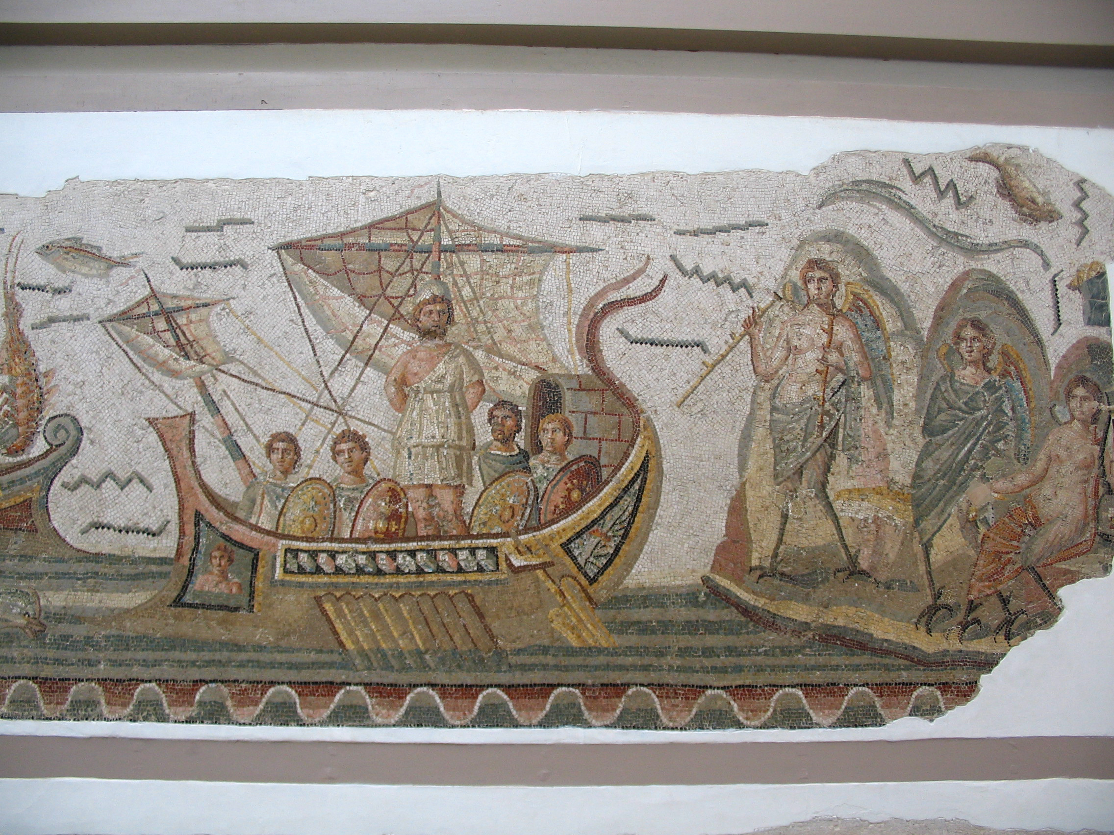 Ulisse e le sirene. Mosaico pavimentale romano al Museo del Bardo a Tunisi. II secolo d.C.